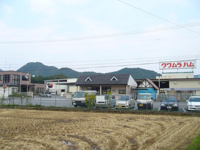 クワムラ食品株式会社本社 中央は直売所